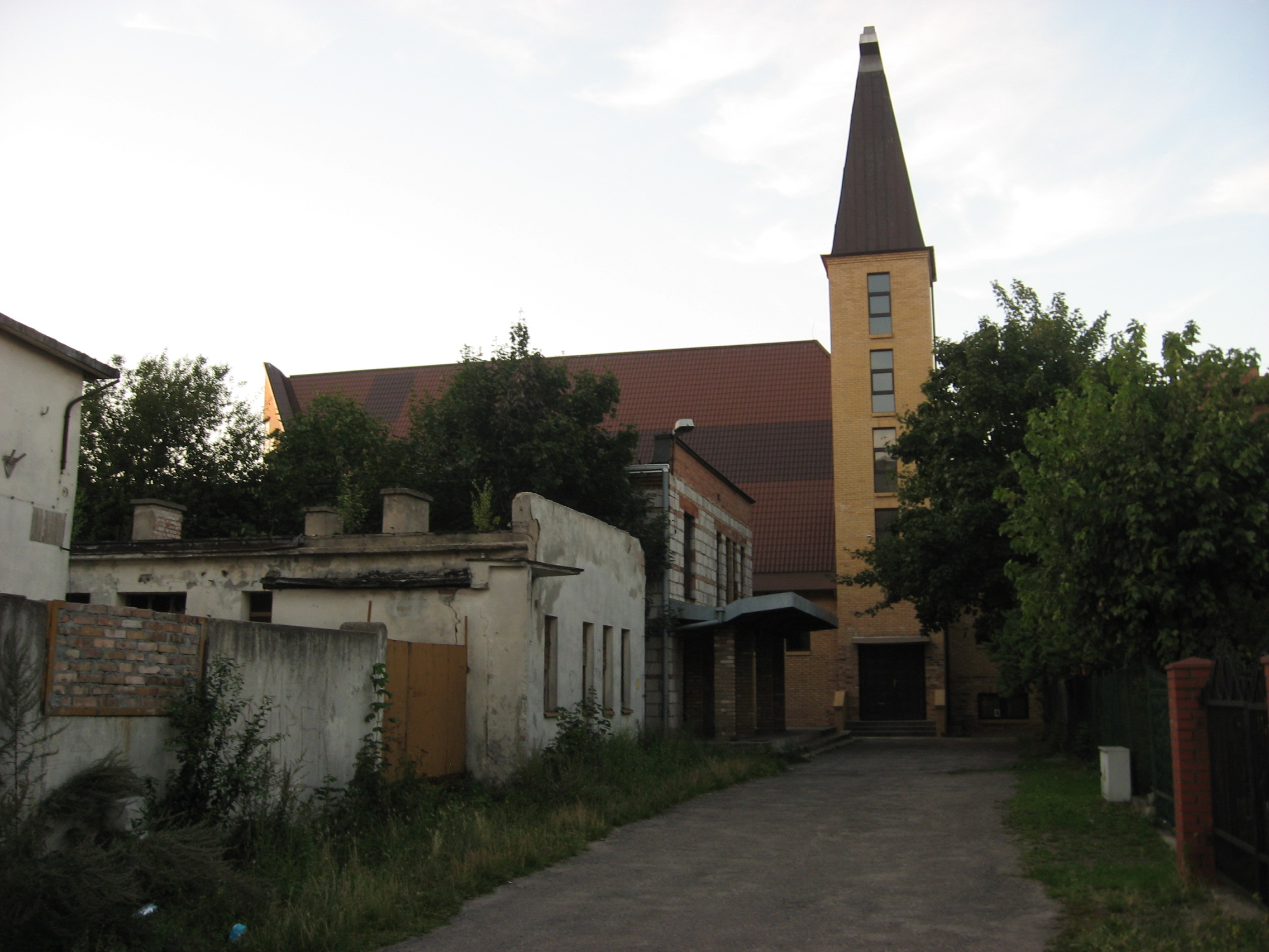 Gdynia Chylonia - kościół parafialny Św. Jana Chrzciciela i Św. Alberta Chmielowskiego (widok od strony ul. Żukowskiej)